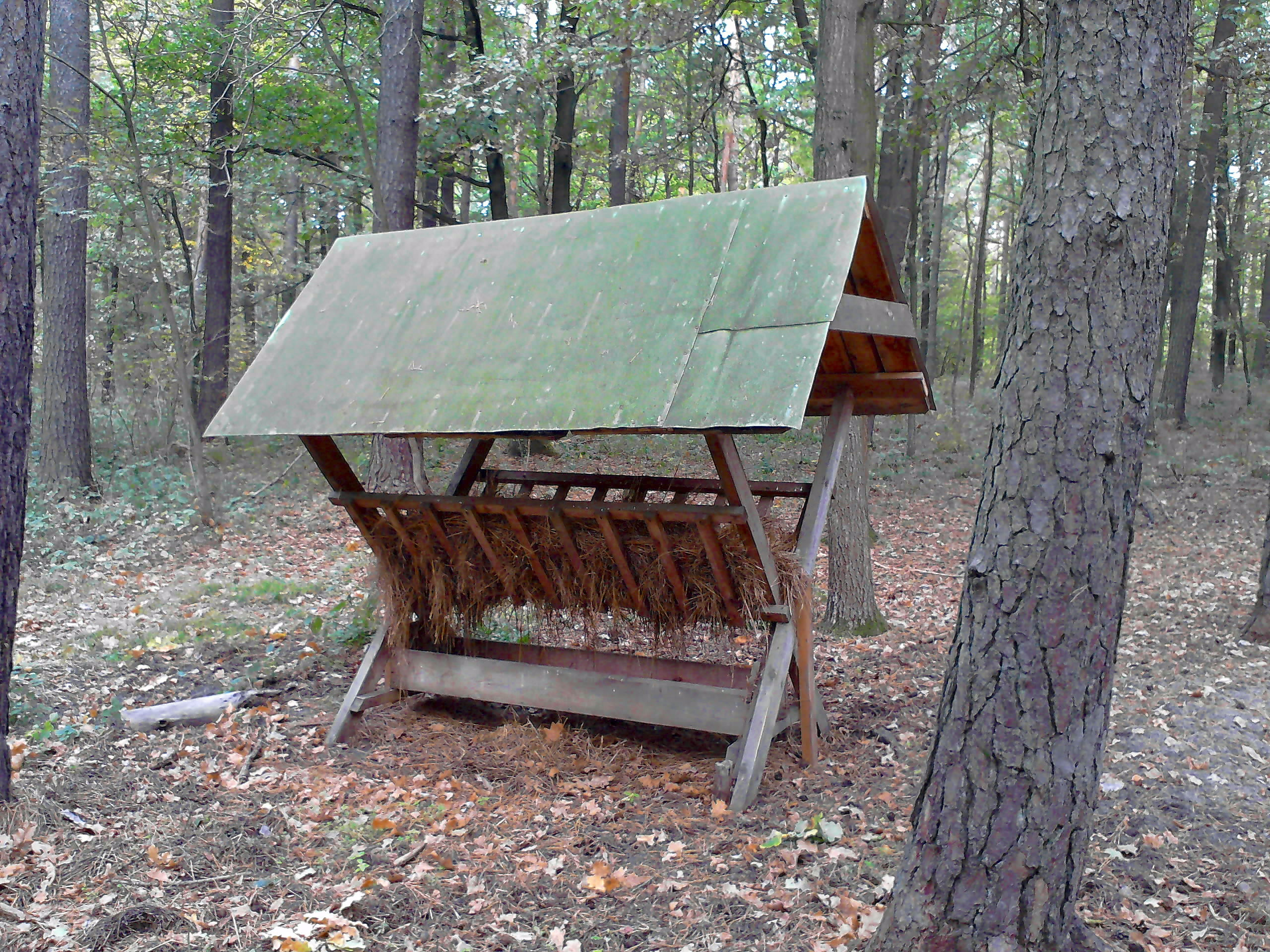 Paśnik służący do dokarmiania zwierzyny leśnej